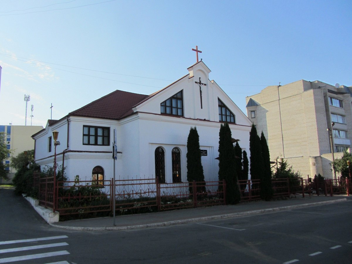 Жлобінскія замалёўкі